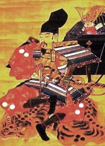 新田義貞肖像（福井市足羽山・藤島神社蔵）